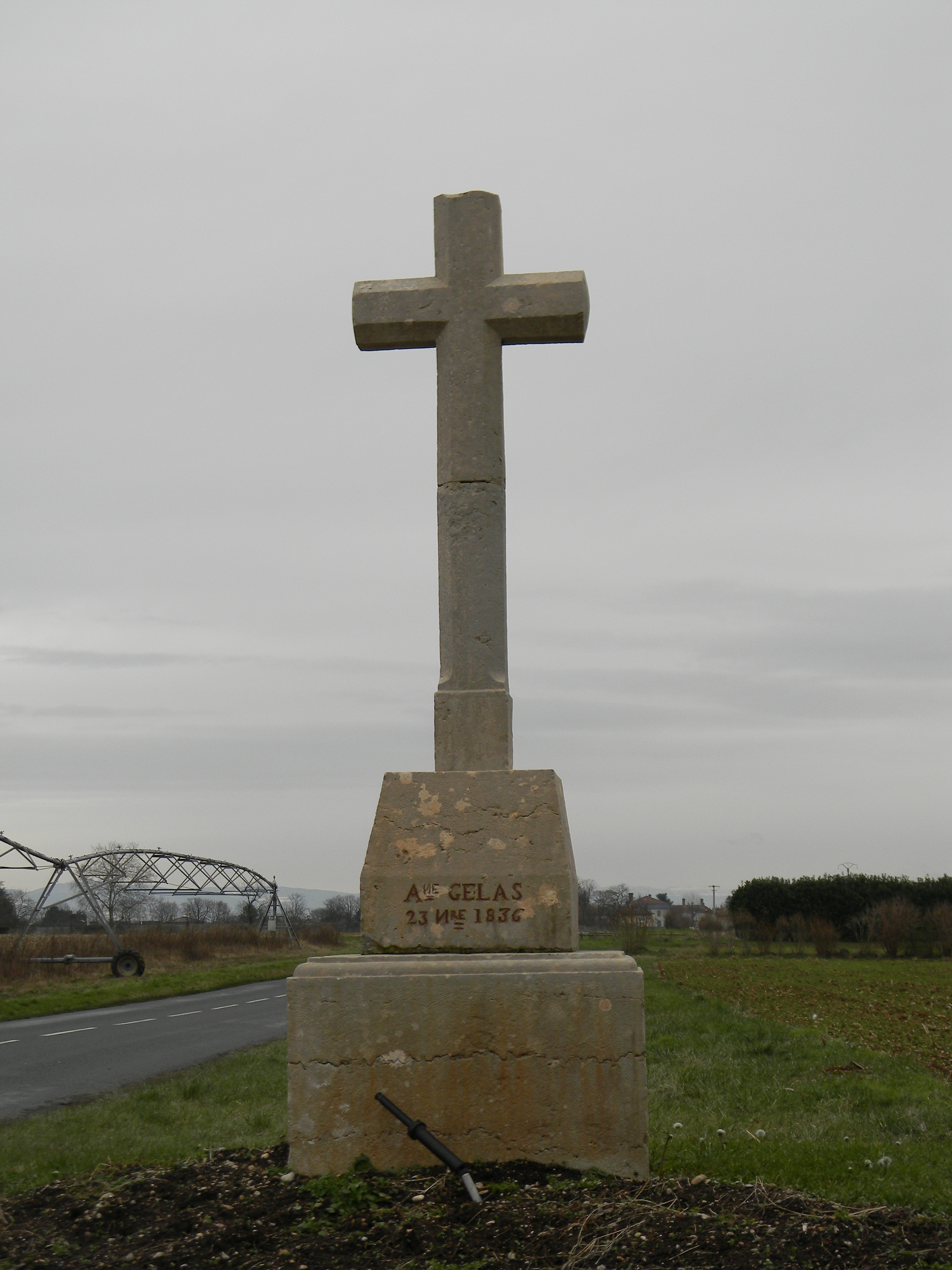 Croix en pierre à l'intersection de la rue du Plateron et la D84C à Balan (Ain). 23 novembre 1836.